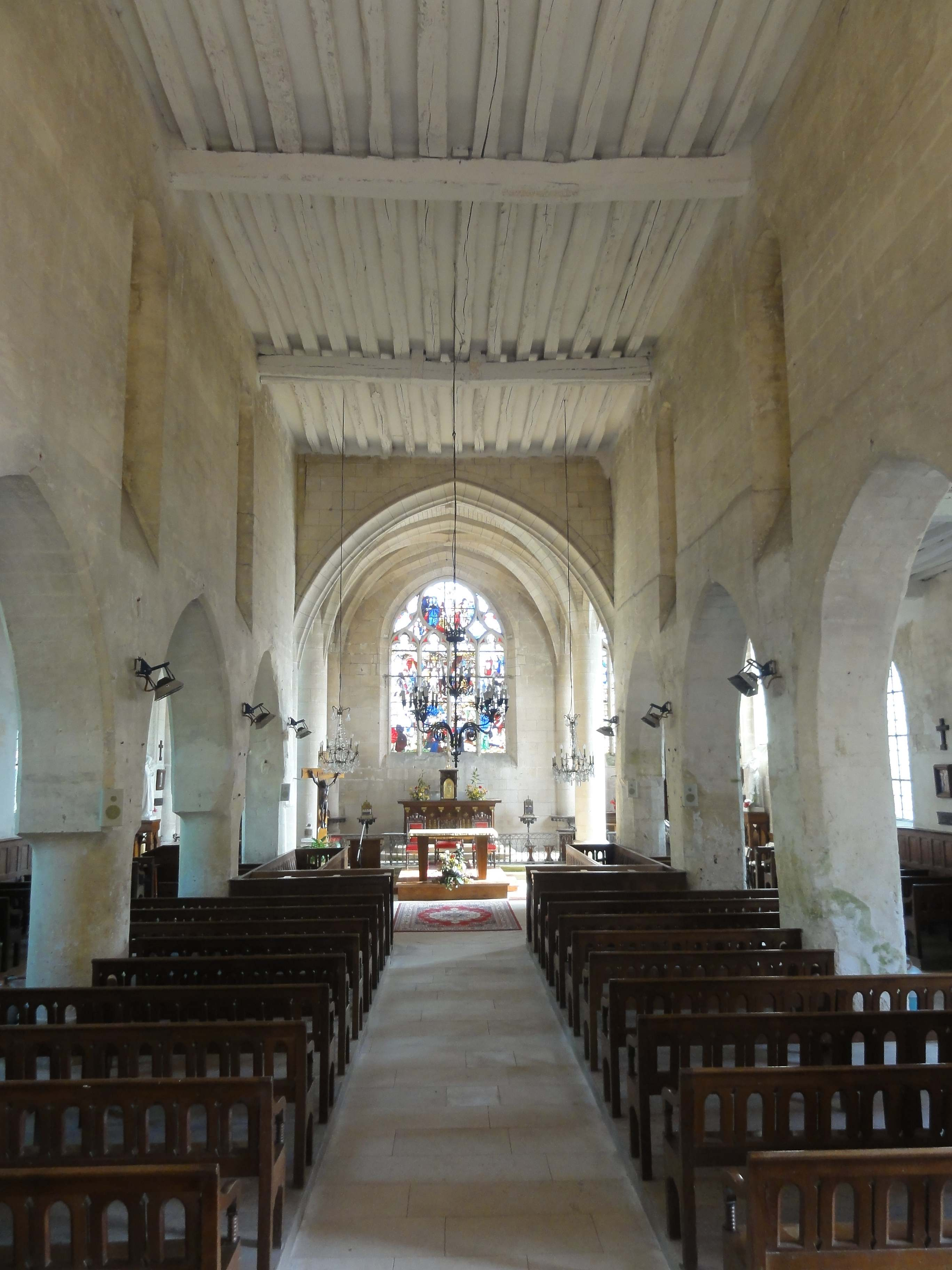 Intérieur de l'église - voir titre.